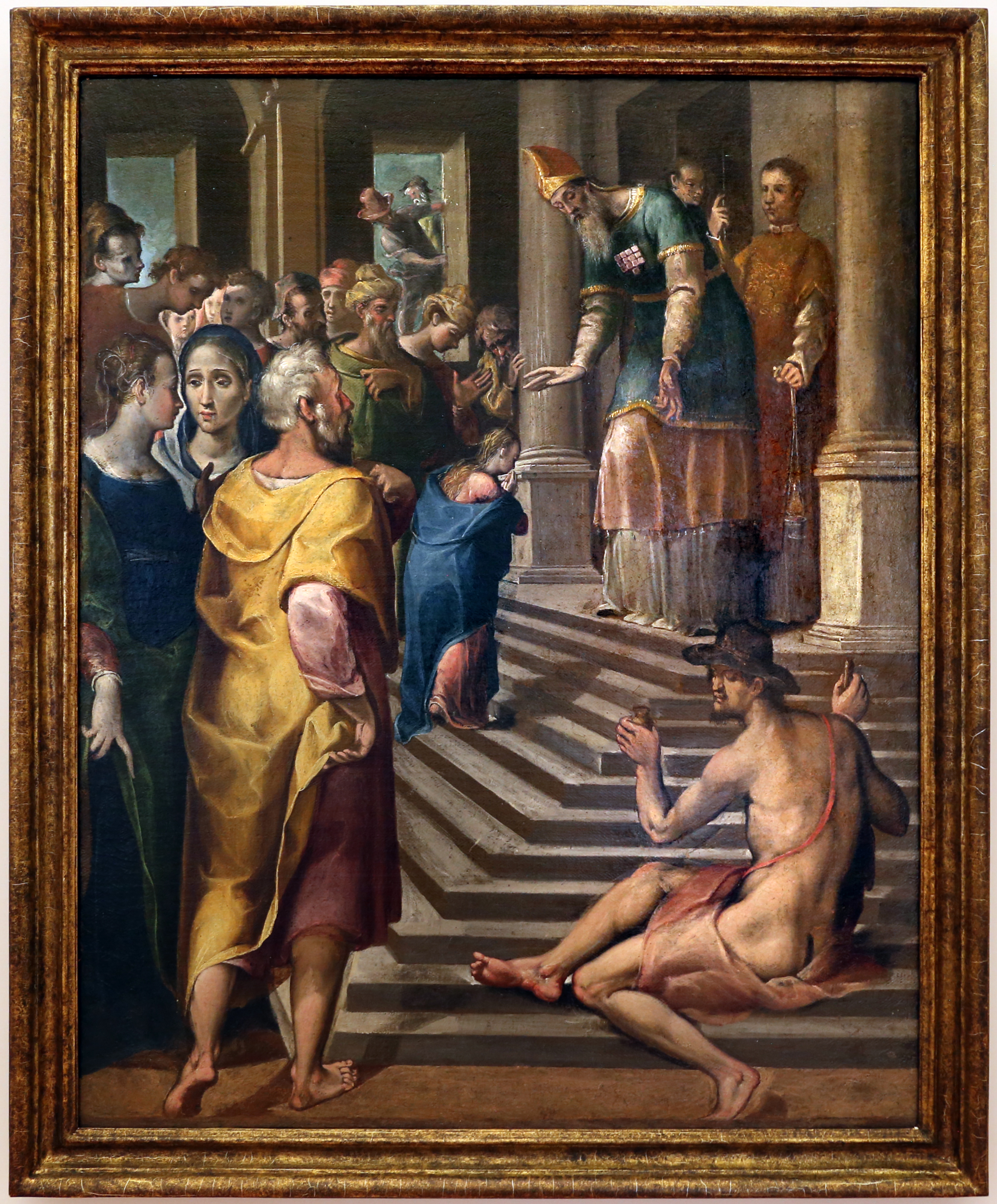 chiesa di San Giacomo Apostolo dei Domenicani This is a photo of a monument which is part of cultural heritage of Italy.